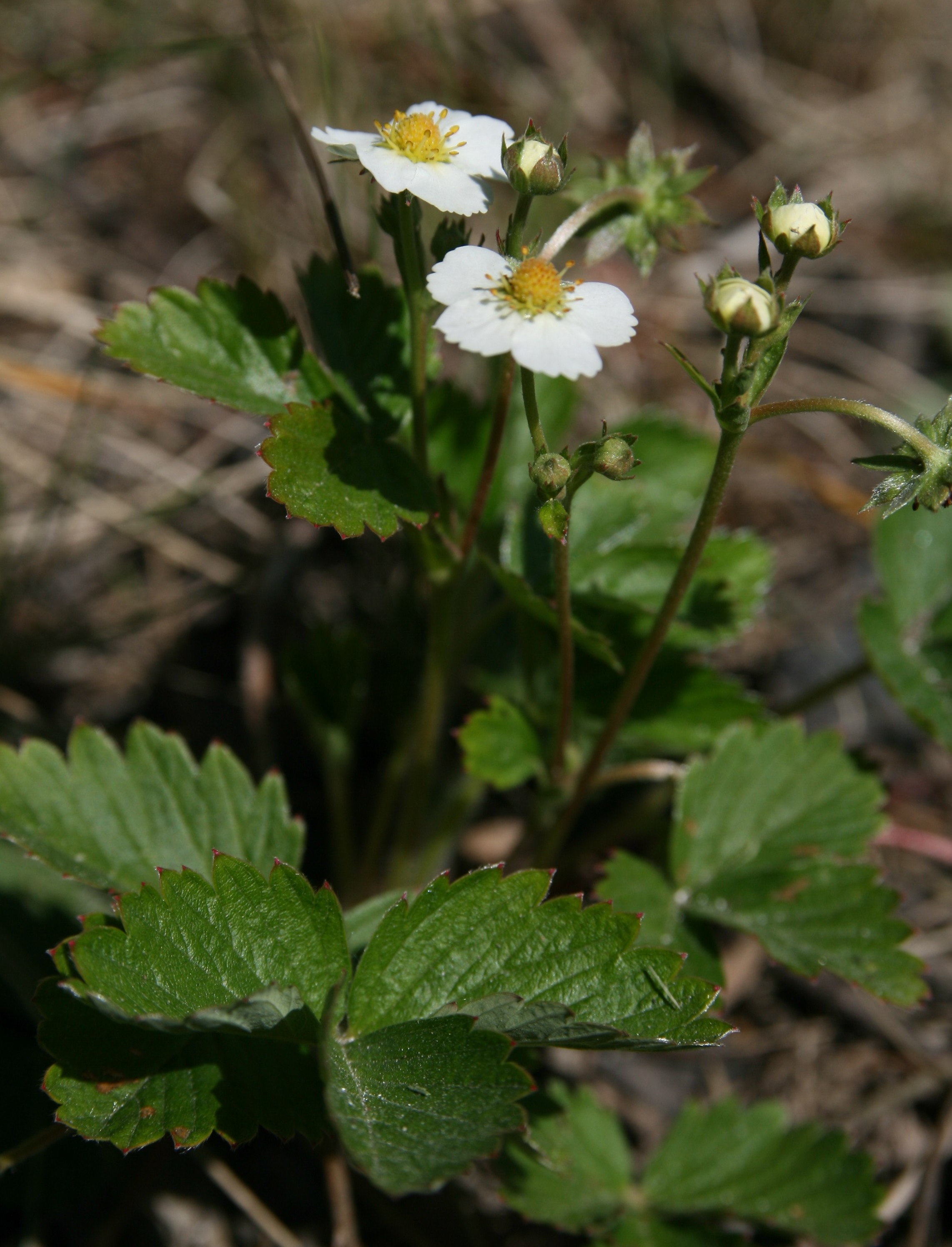 Ahomansikka (Fragaria vesca)